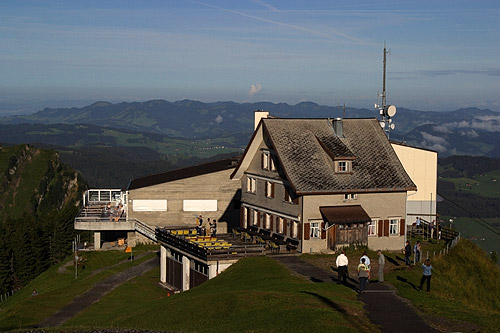 Bergstation und Berggasthaus Kronberg (1663 m.ü.M)